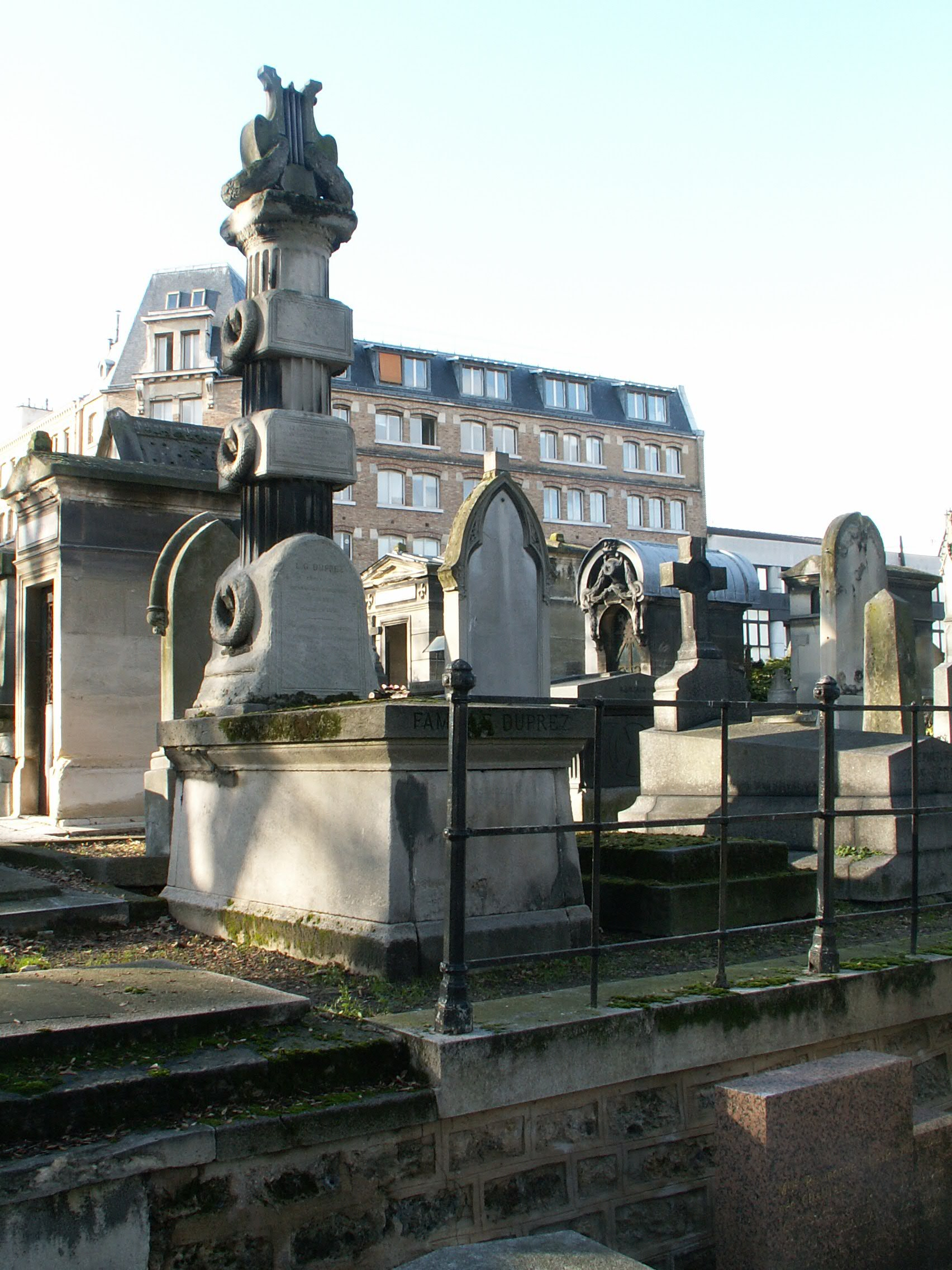 tombe de Gilbert Duprez au cimetière de Montmartre (12ème division)